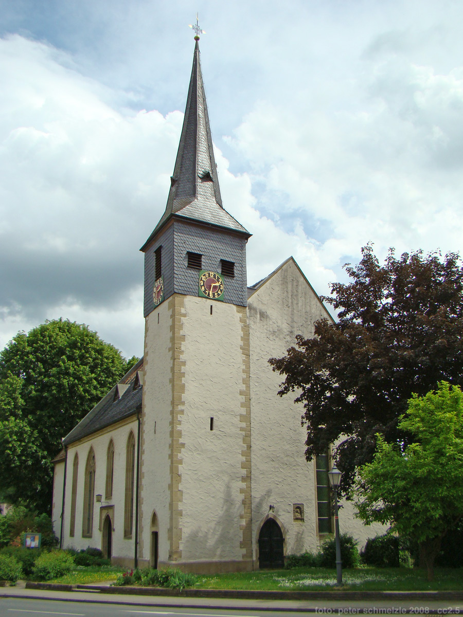 Evang. Kirche in Widdern